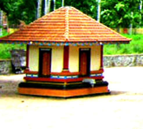 ഉപദേവതാ അമ്പലം, പട്ടണക്കാട്